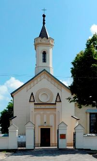 Kościół pw. Wniebowzięcia NMP i św. Antoniego z Padwy.